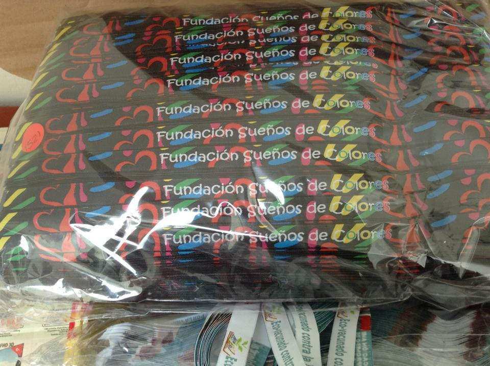 [1] tejidas] realizadas en hilo tipo damasco por artesya, Bogota Colombia